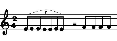 Septillo de 7 corcheas que equivalen a 4.